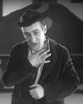 Screenshot, catturato da me, del provino di Totò alla Cines pubblicato dalla Rivista Cines n.4 1930. Le "Riviste Cines", cortometraggi-cinegiornali, furono proiettate nelle sale cinematografiche tra il 1930 e il 1934. Licensing Categoria:Immagini di Antonio De Curtis